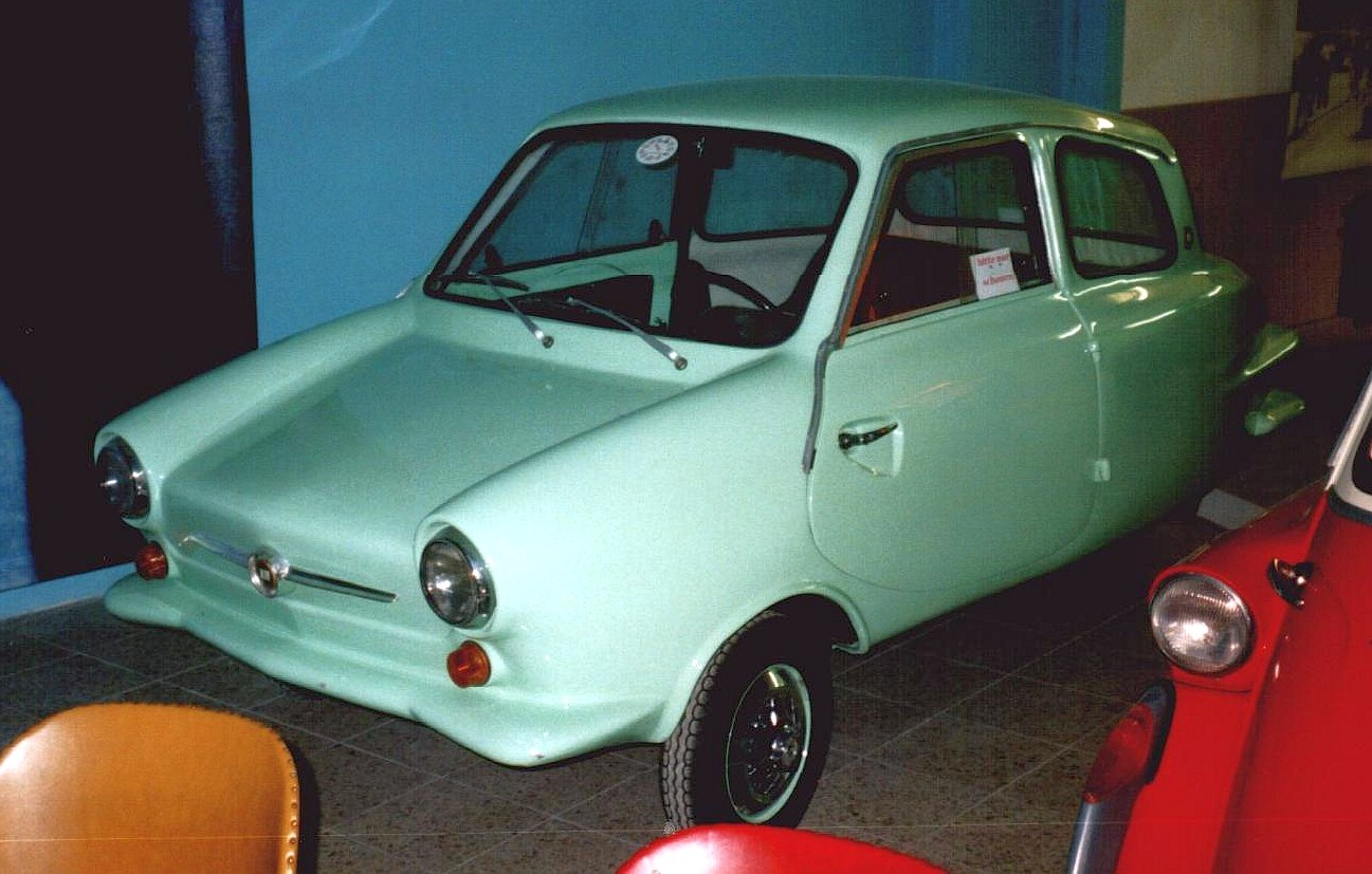 Alta von 1968 im Museum RRR Roller, Rollermobile & Wurlitzer in Eggenburg, Österreich.